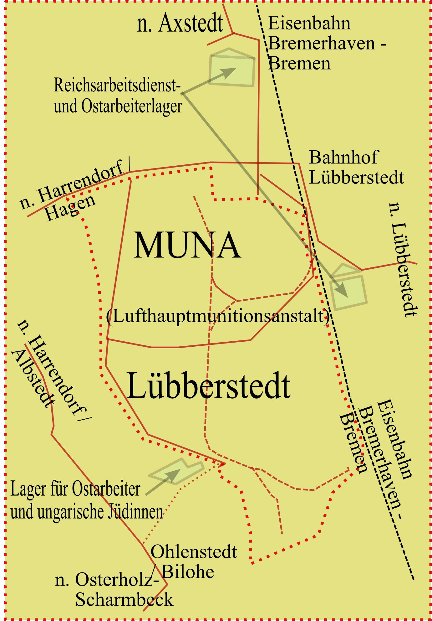 Plan der MUNA Lübberstedt